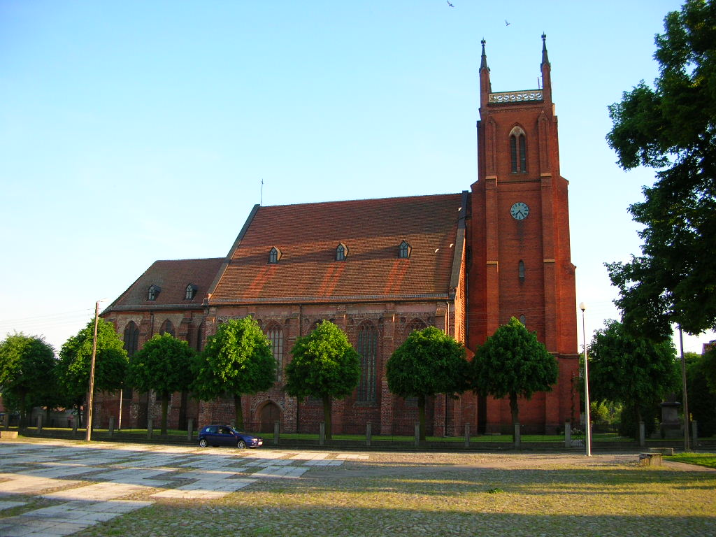 Dobiegniew - Kościół